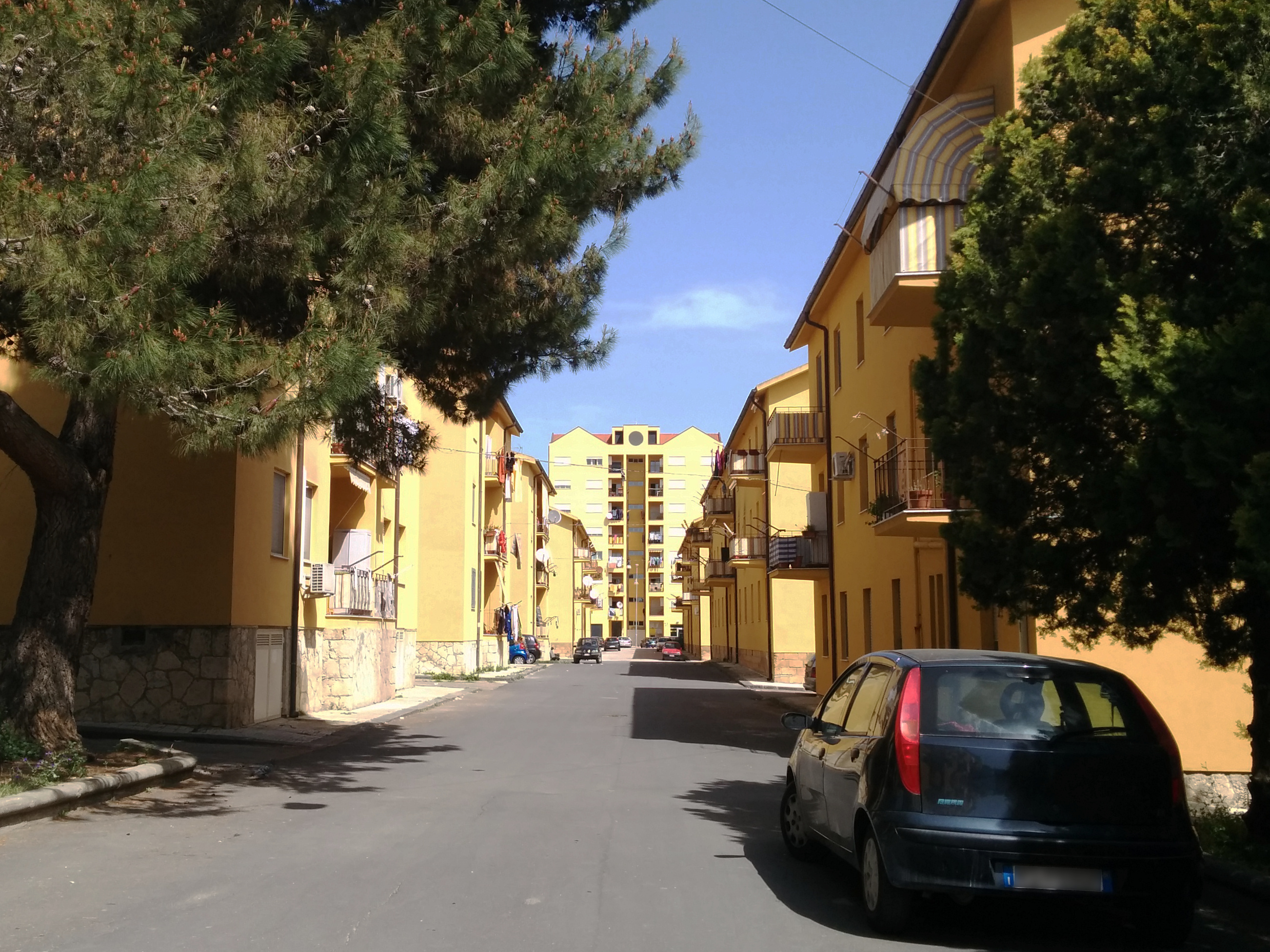 Scorcio del villaggio Santa Barbara